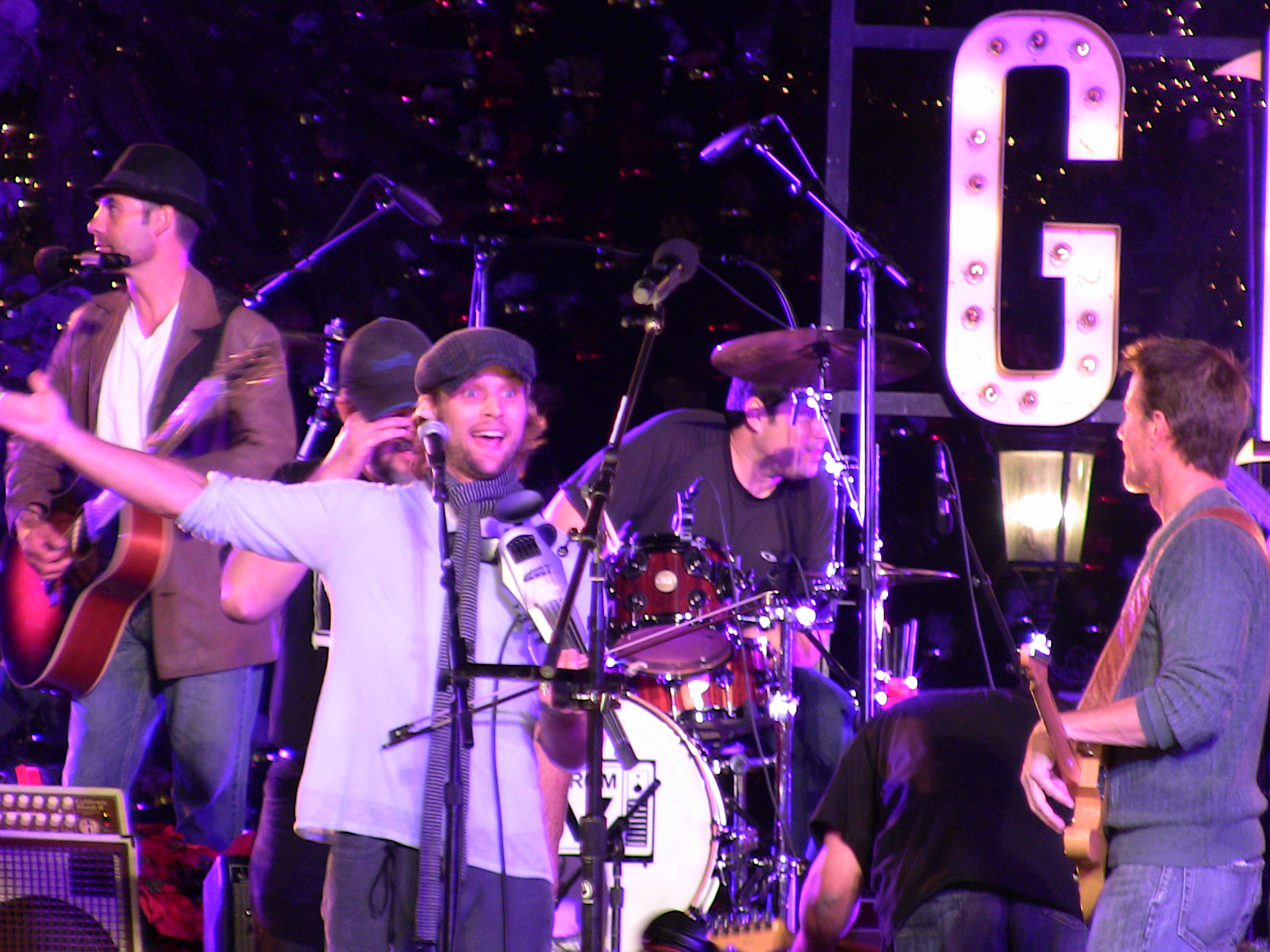 Jesse Spencer mentre suona nella Band From TV.